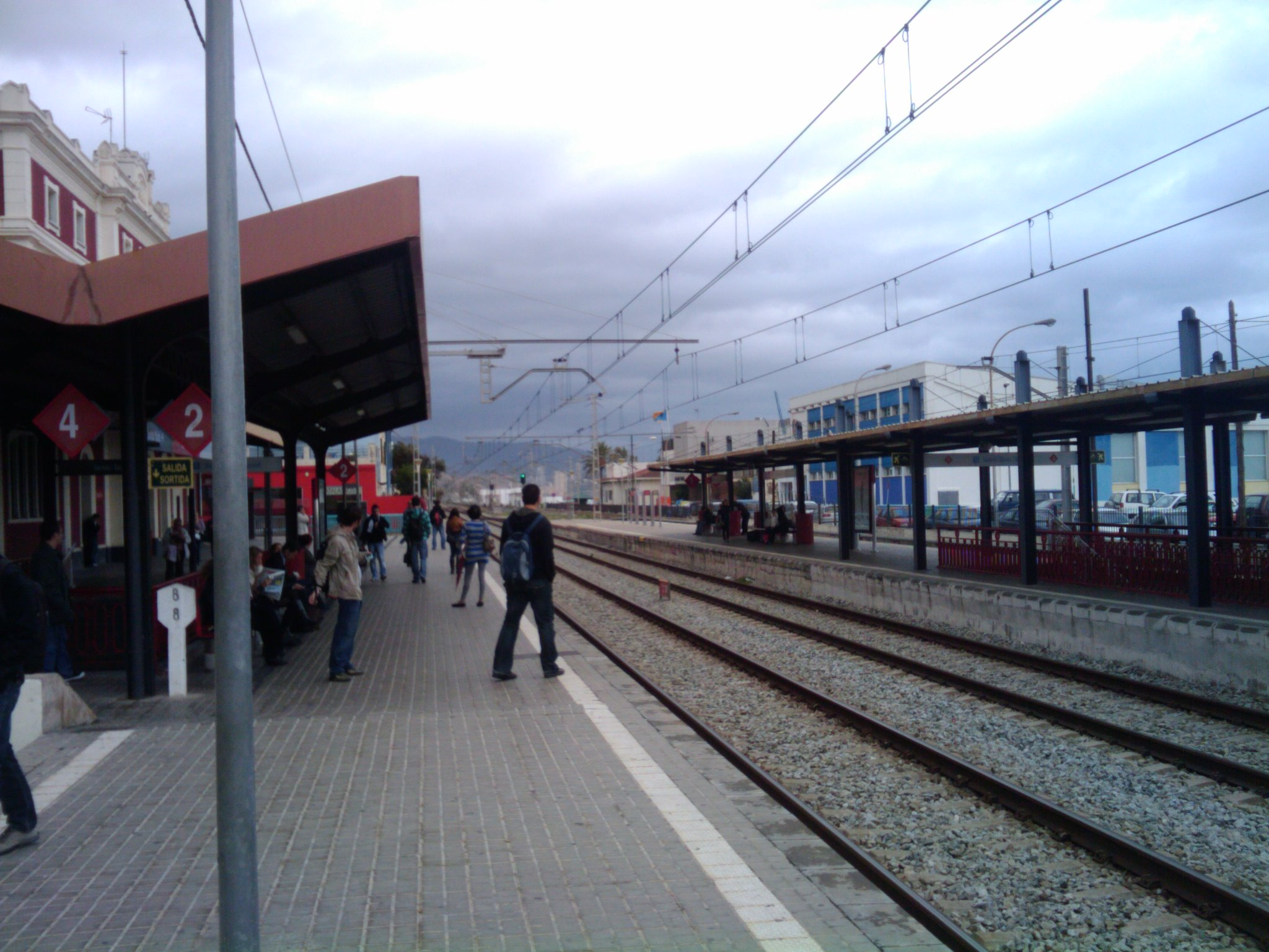 Estació de tren (ADIF) de Badalona. Dia gris.pero no hace frio.esperando el tren.probando la camara del nuevo android...